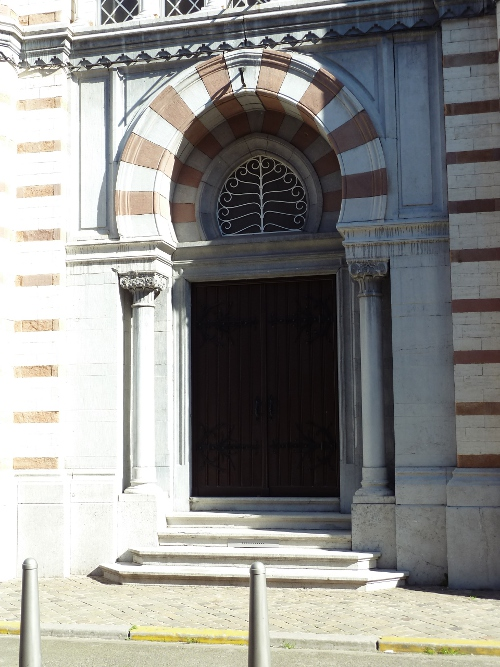 Lüttich-Outremeuse: In der Heimat von Georges Simenon